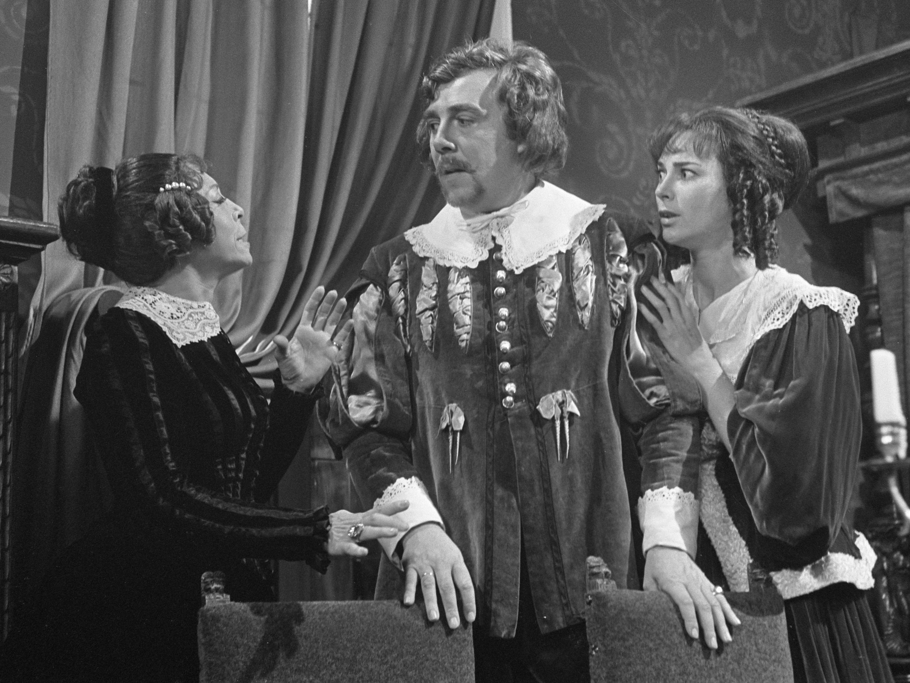 V.l.n.r. Caro van Eijck, (mevrouw Musch), Coen Flink (ritmeester Buat) en Sigrid Koetse (Elisabeth Musch) in TV-feuilleton "Ritmeester Buat" 29 augustus 1968